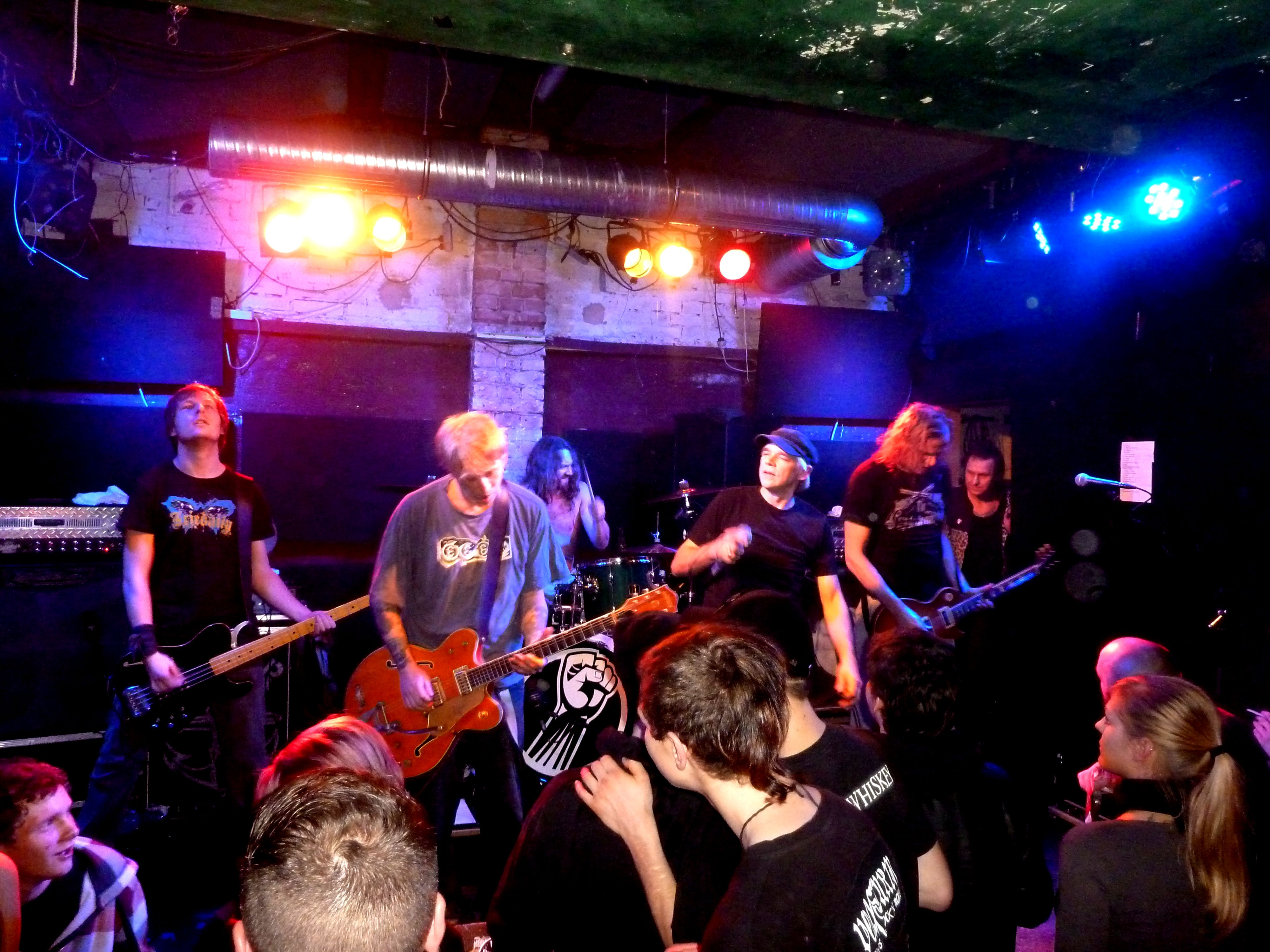 Die Skeptiker